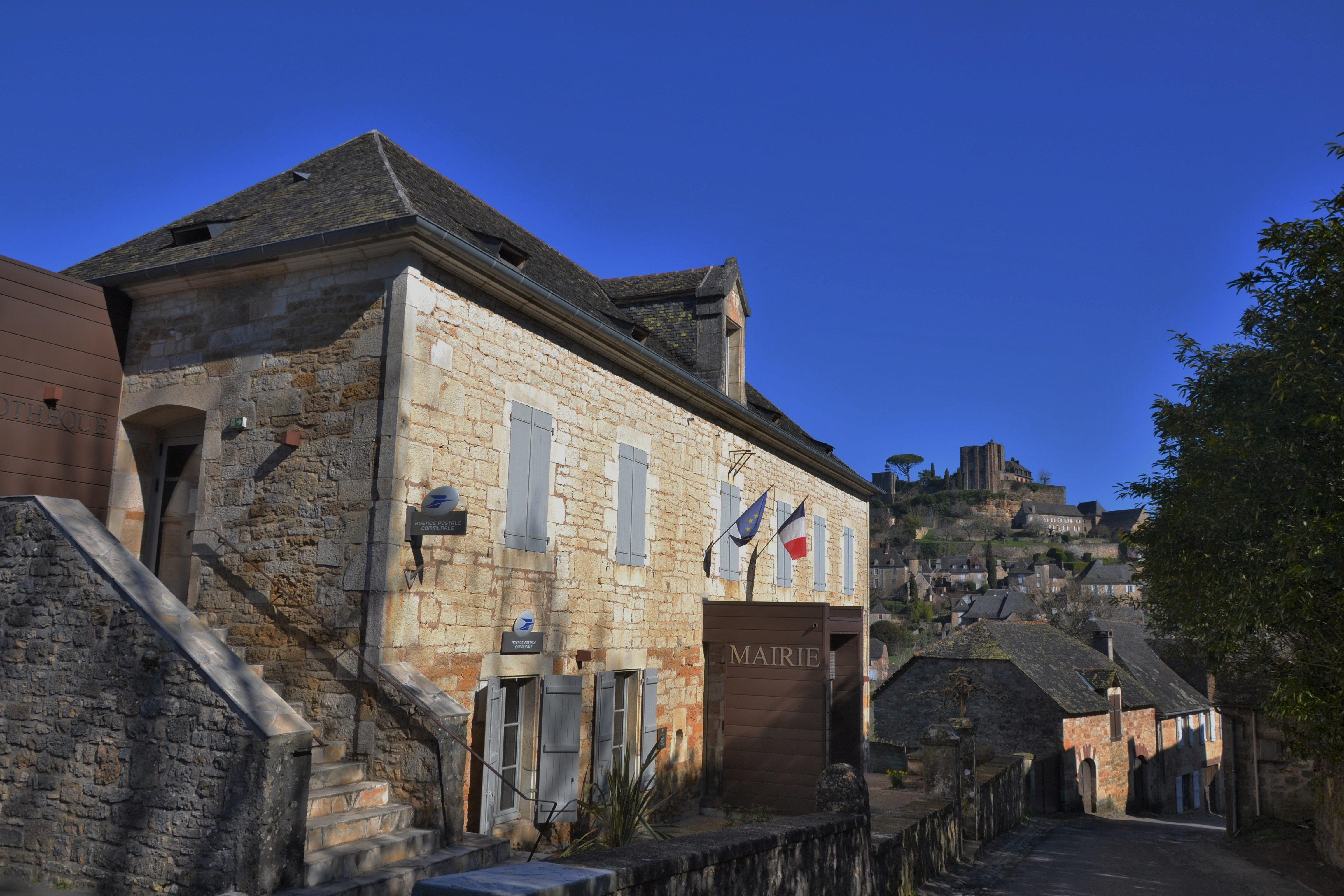 à Turenne